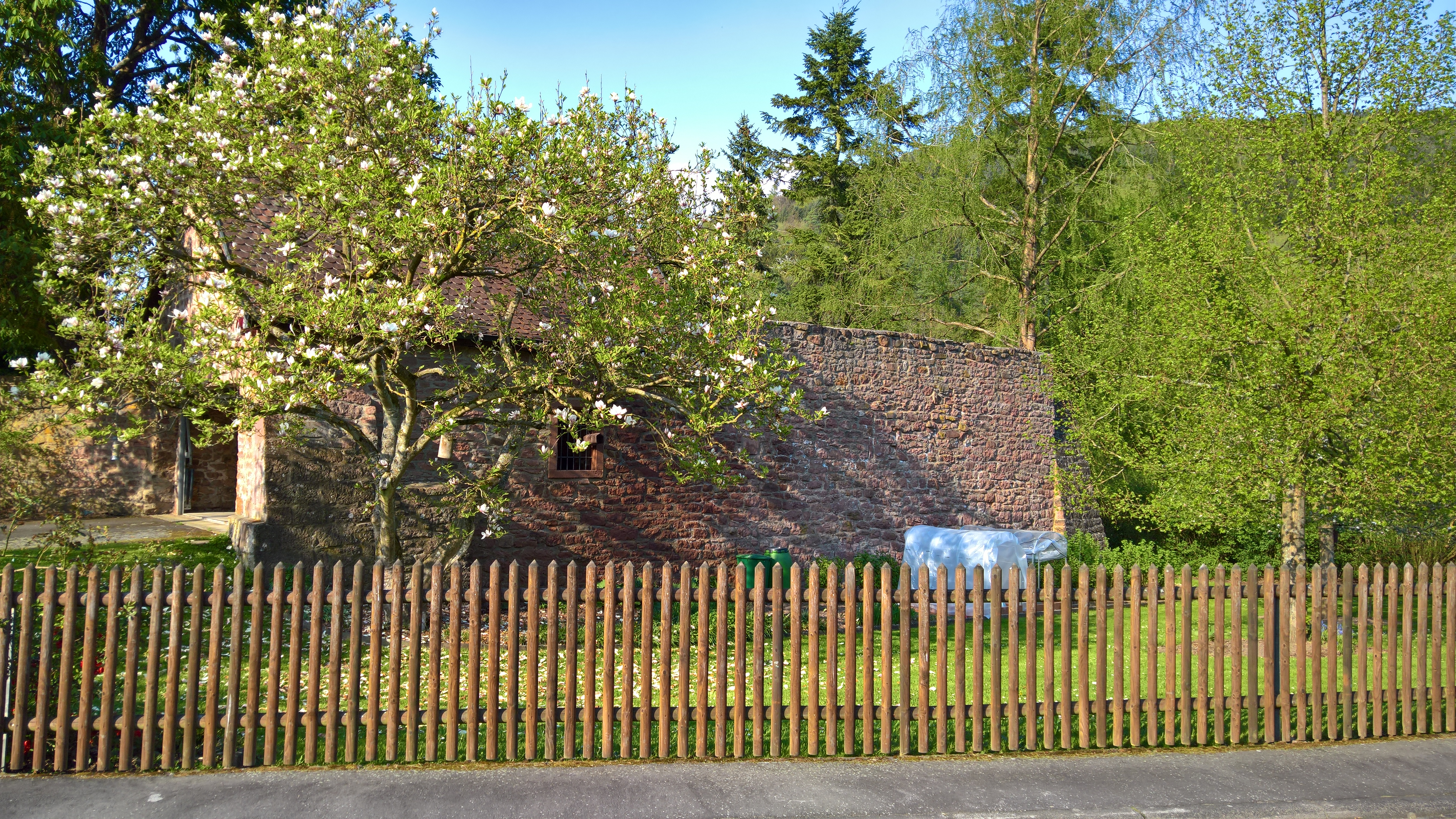 Wasserburg Riedern: Mauerreste der ehemaligen Wasserburg